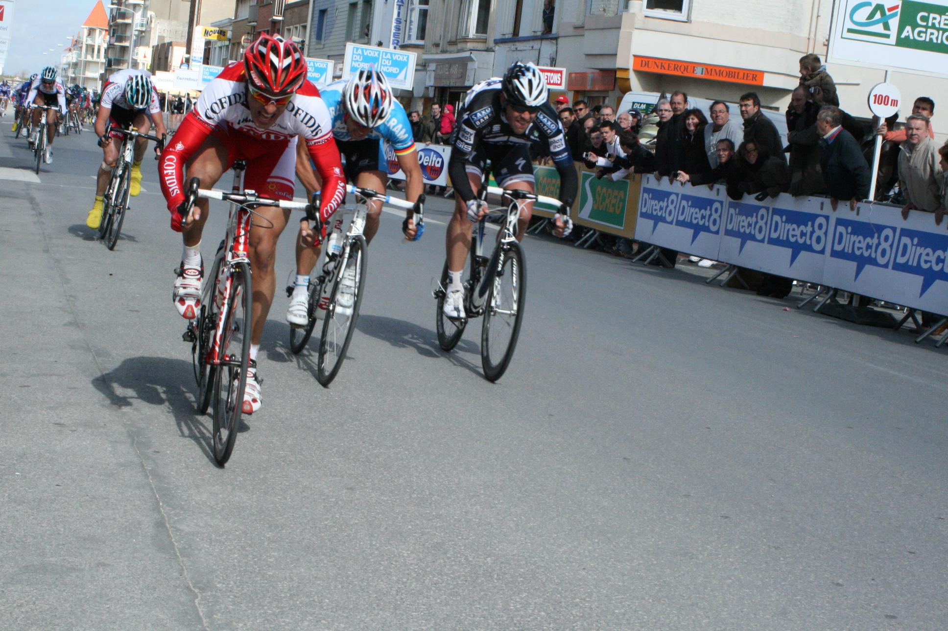 Kevyn Ista, Gerald Ciolek et Alex Rasmussen à l'arrivée de la 1re étape des Quatre jours de Dunkerque 2010